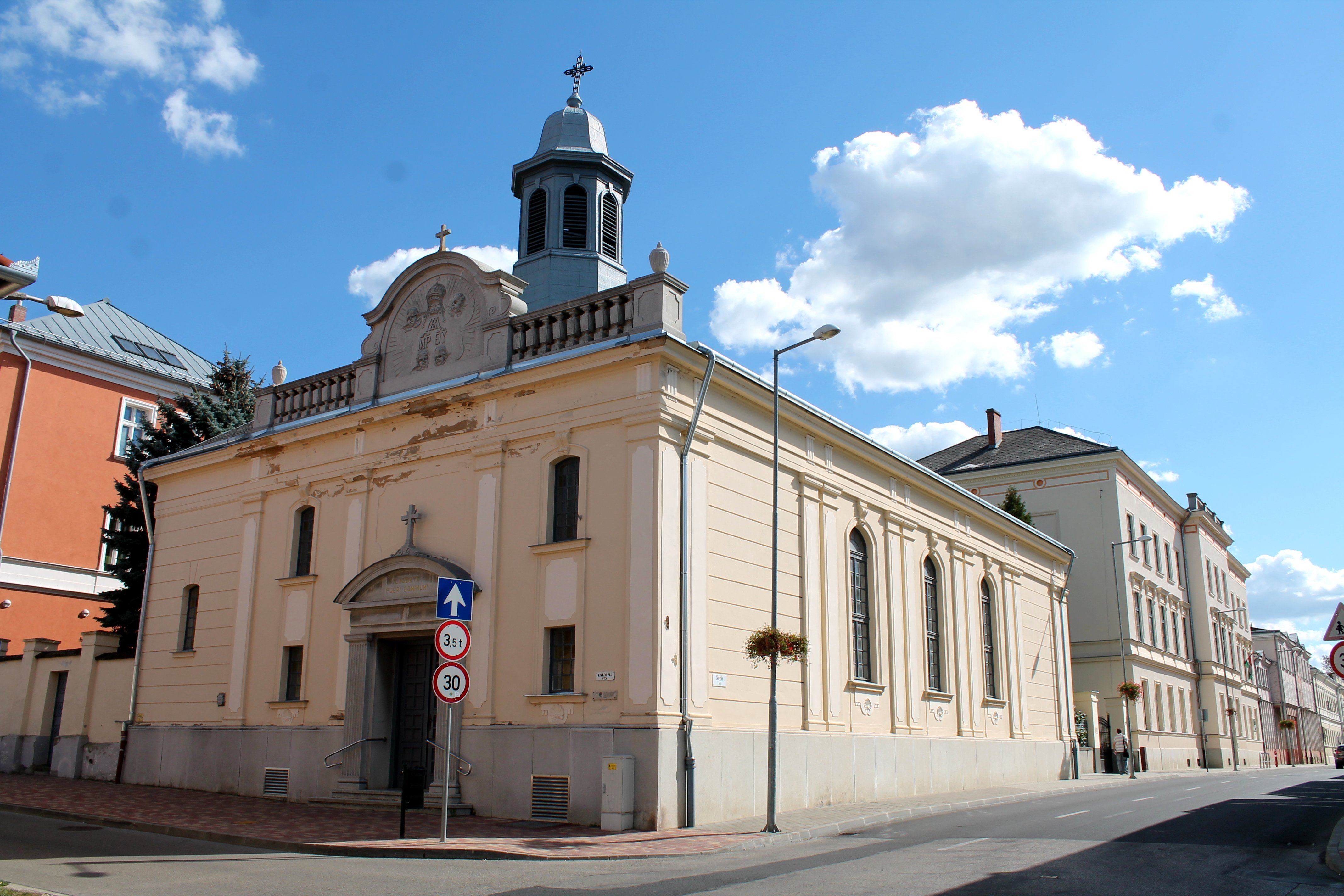 A nagykanizsai piarista kápolna és a piarista diákotthon épületei